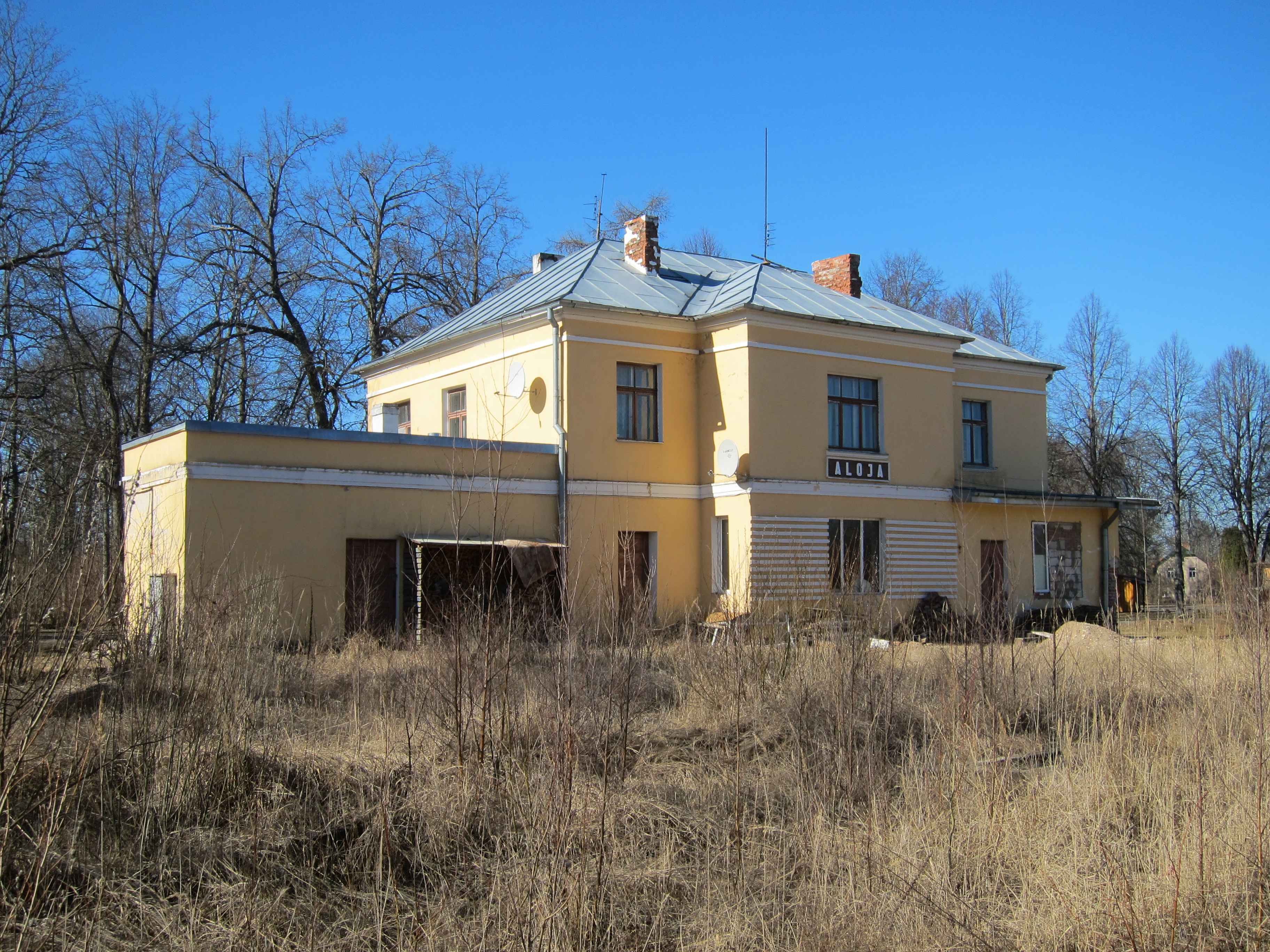 Alojas stacijas ēka